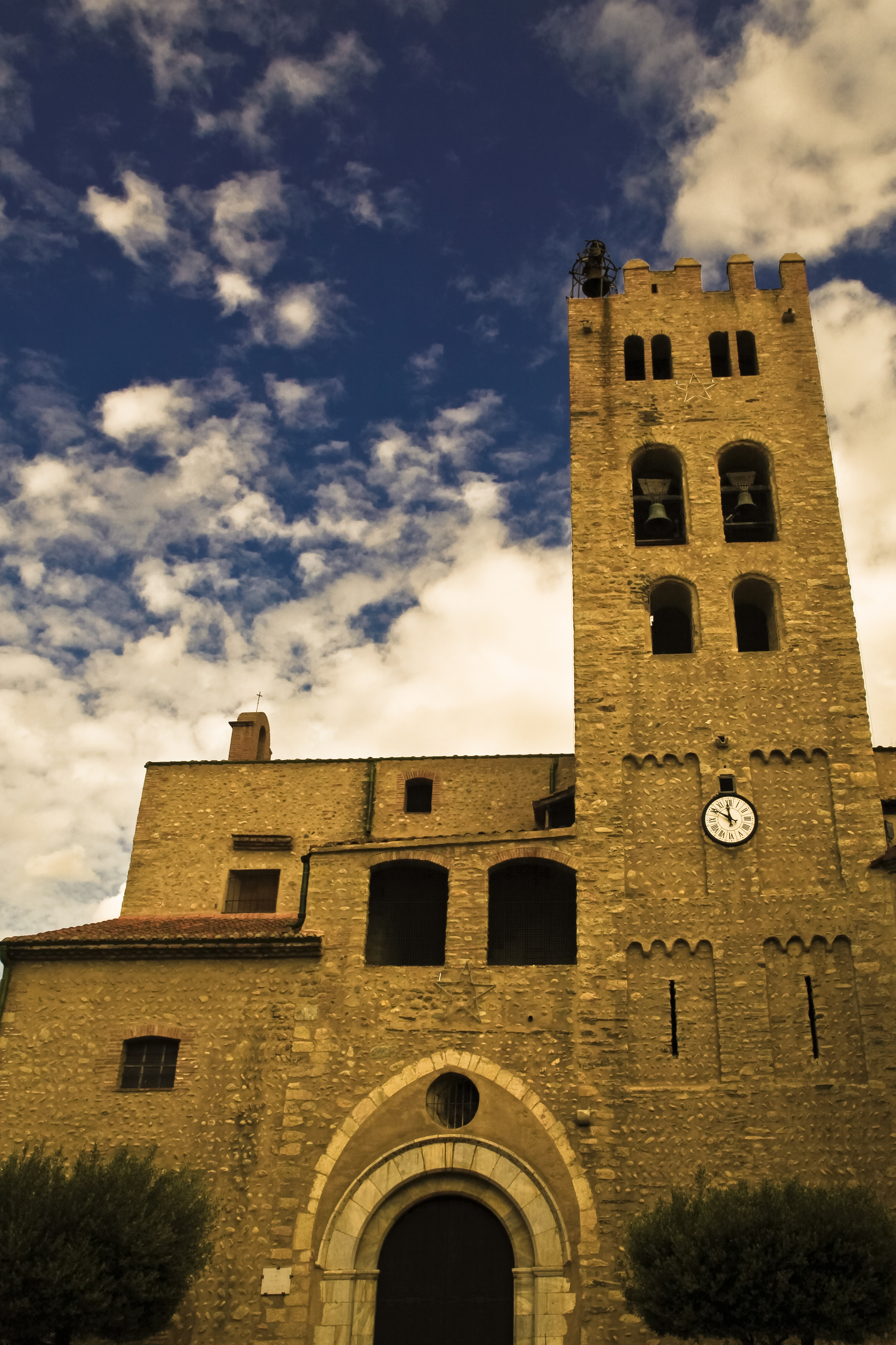 Église Sainte-Eulalie de Millas (Inscrit) .